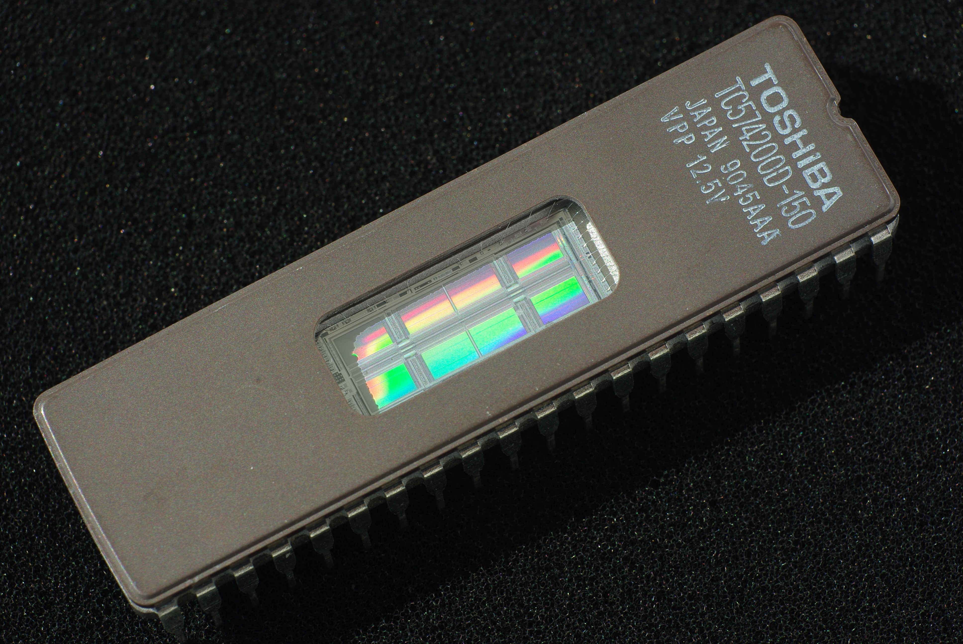 4Mbit EPROM Toshiba TC574200D